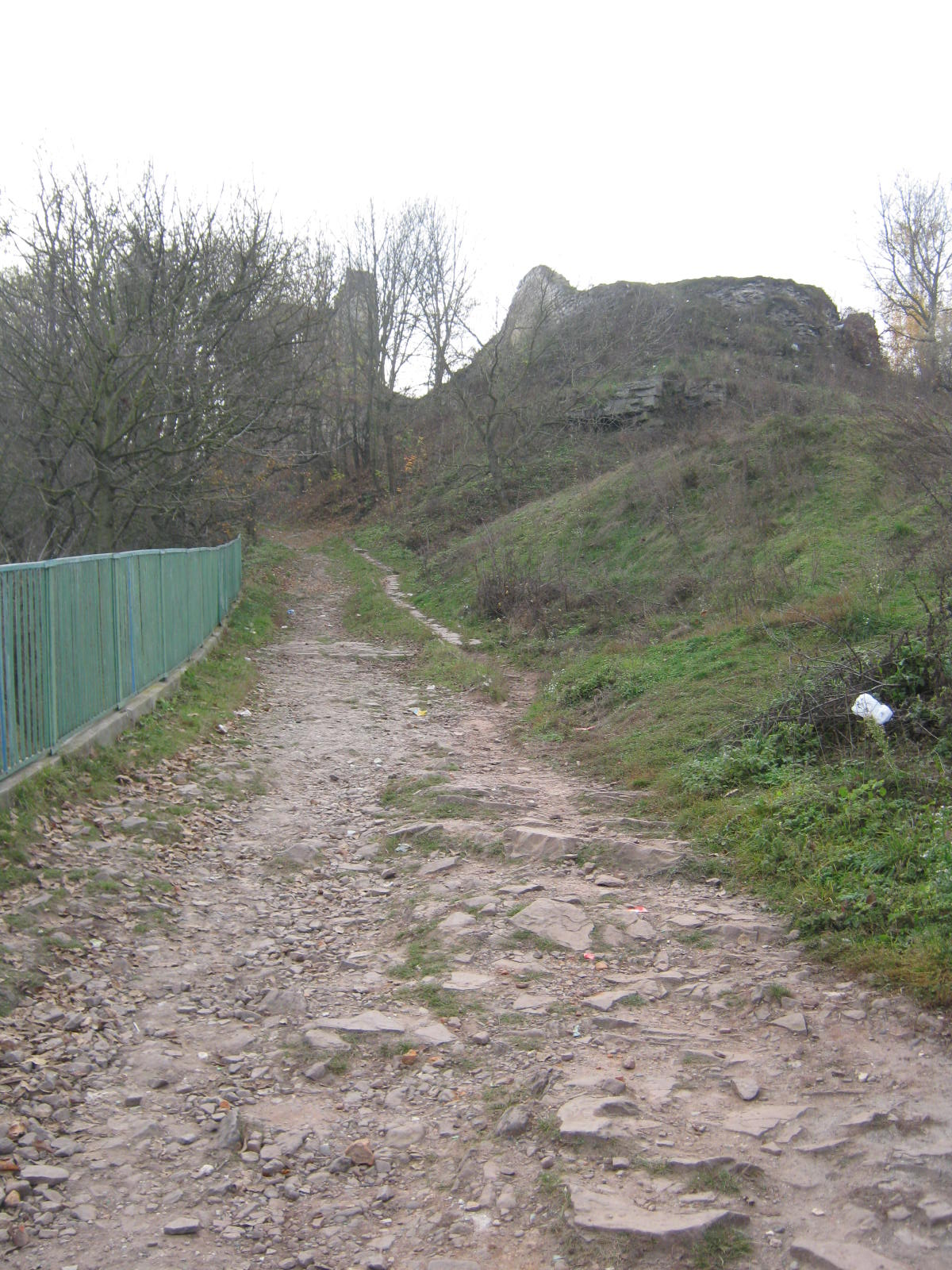 Стара доріжка від костелу до замку. Бучач